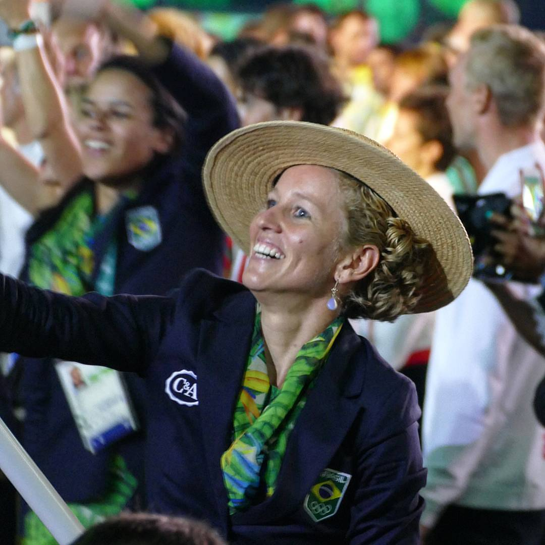 A porta-bandeira do #timebrasil, Yane Marques, feliz da vida na abertura da #rio2016